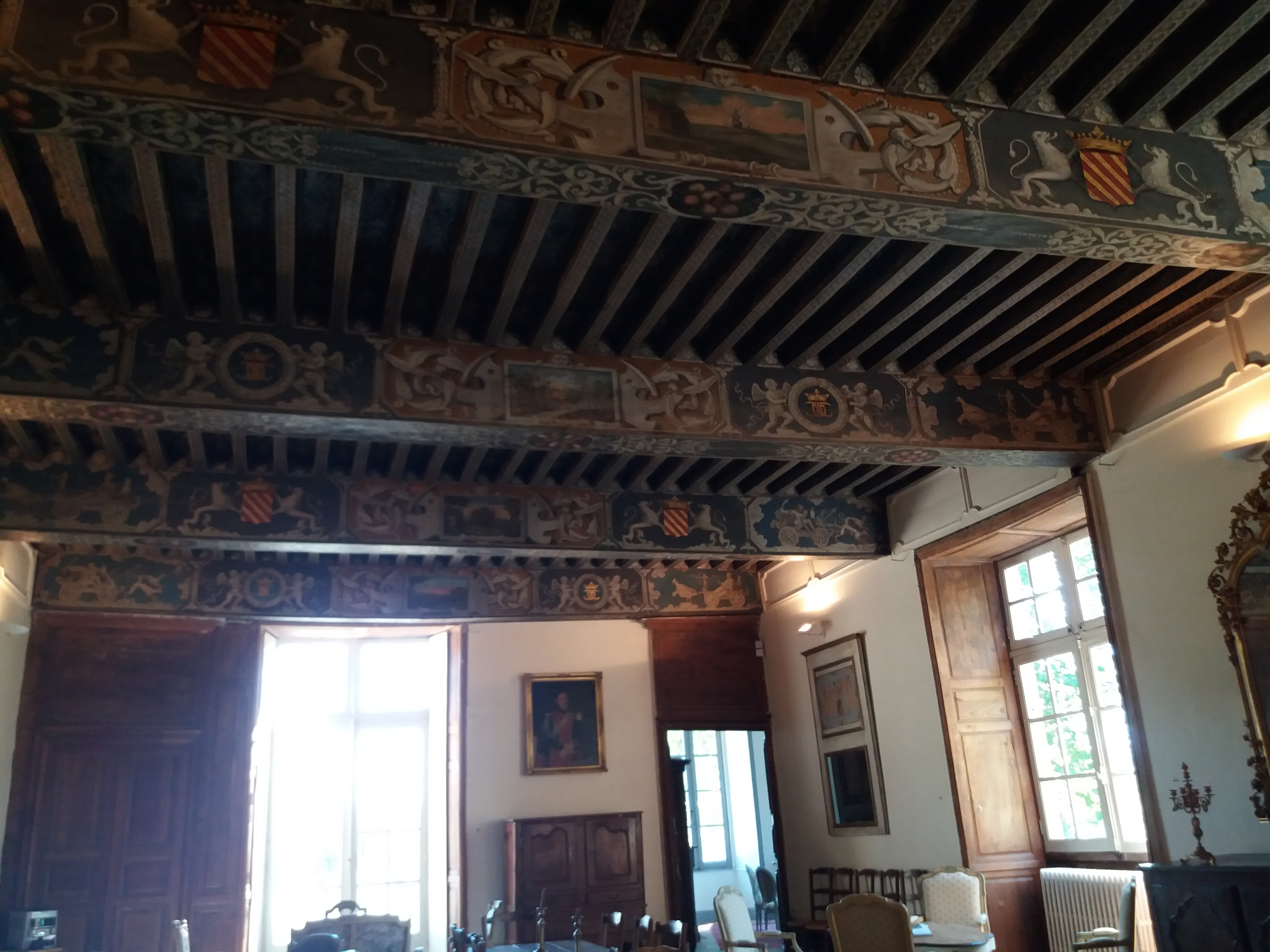 interieur château d'Aynac